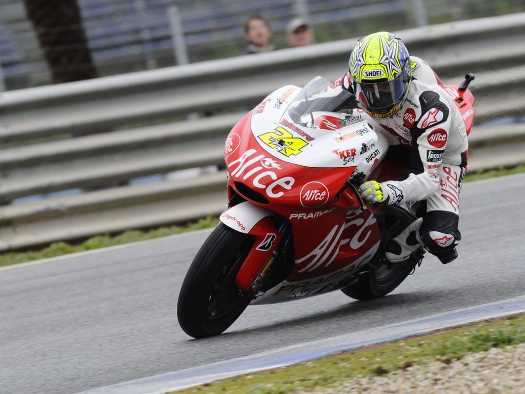 Toni Elias in IRTA Jerez Test 2008